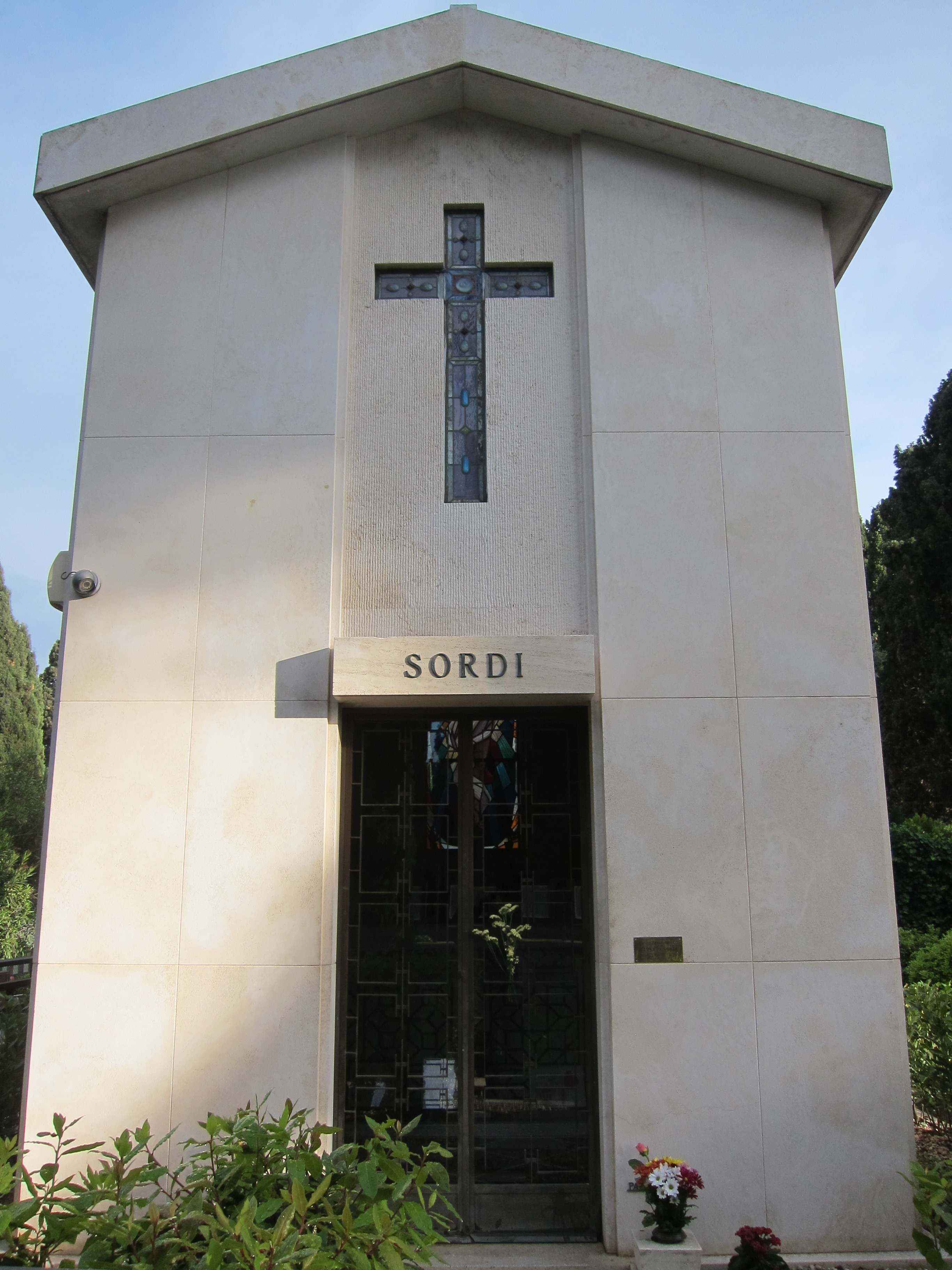 Tombe d'Alberto Sordi au cimetière communal monumental de Campo Verano à Rome.